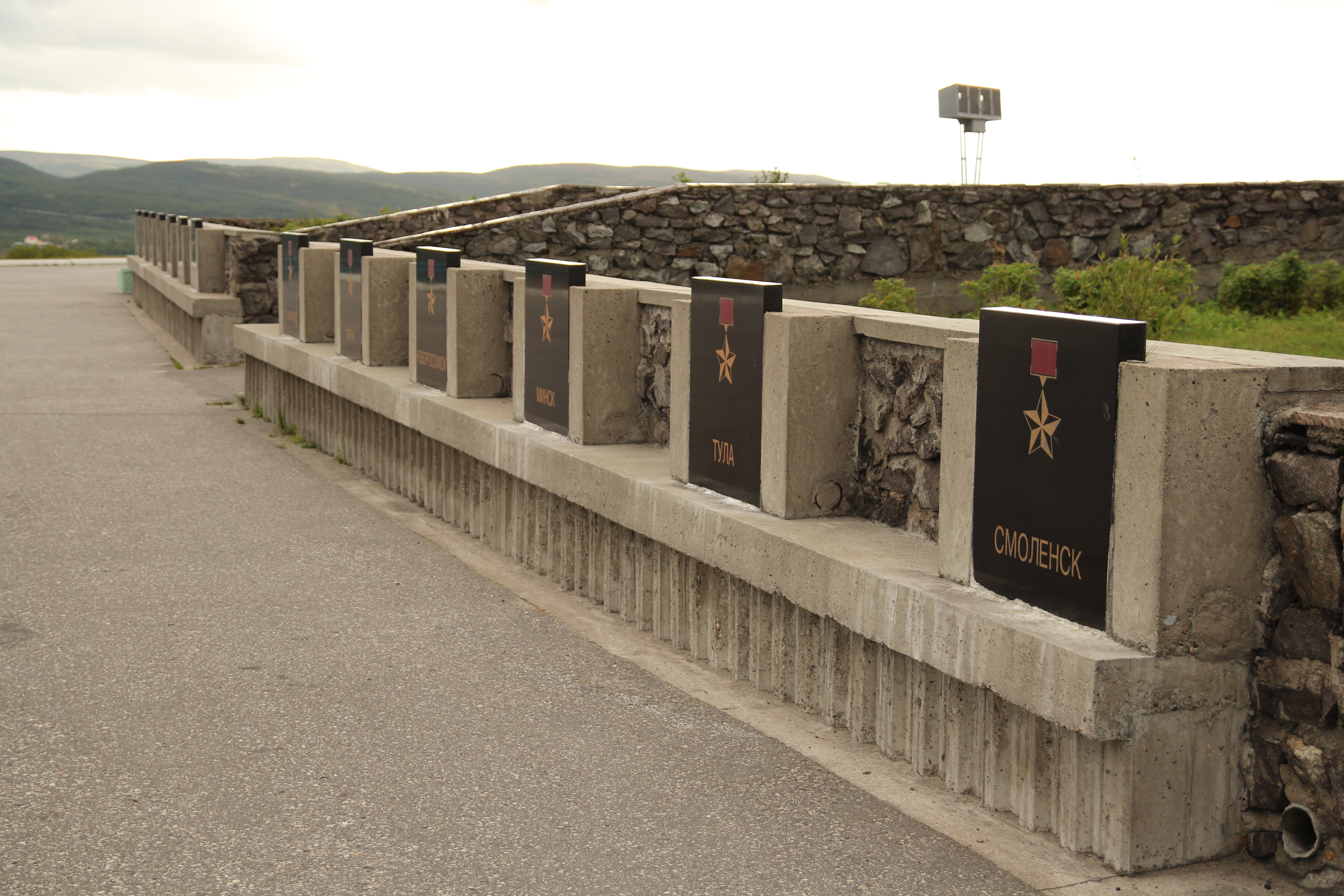 Аллея городов-героев в Мурманске